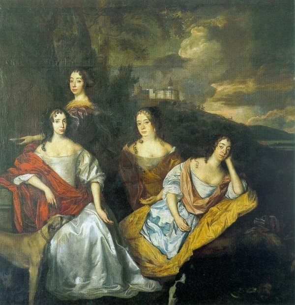 Bildnis der Töchter Friedrich Heinrichs von Oranien. Die Schwestern Luise Henriette mit Oranienburg, Albertine Agnes mit Oranienstein, Henriette Catharina mit Oranienbaum und Marie von Oranien-Nassau mit dem untergegangenem „Oranienhof“ in Kreuznach.